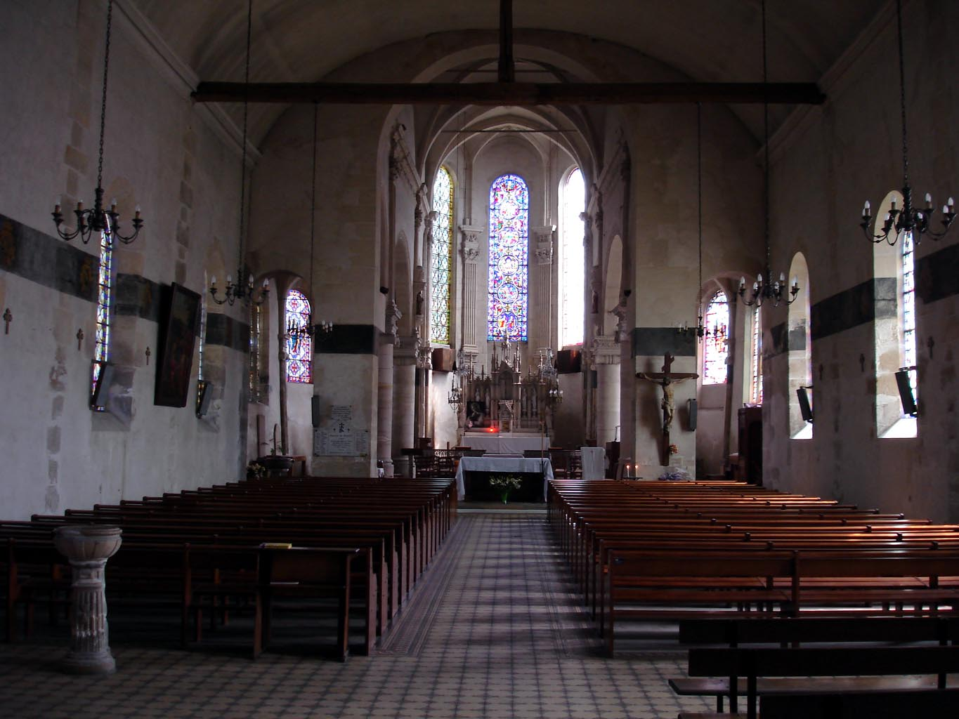 Nef de l'église Saint-Eloi à Roissy-en-France (Val-d'Oise), France